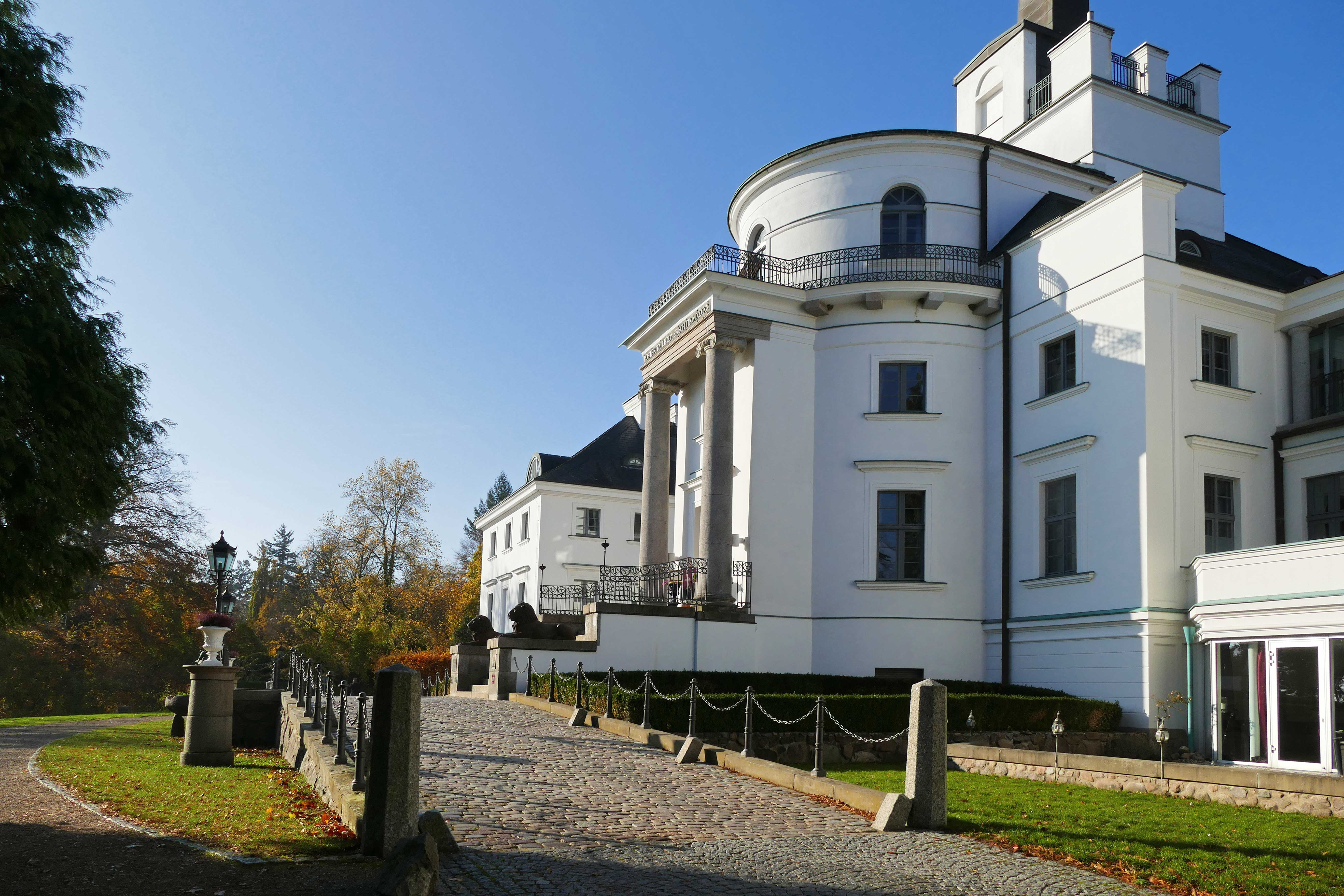 Burg Schlitz Haupthaus im Herbst